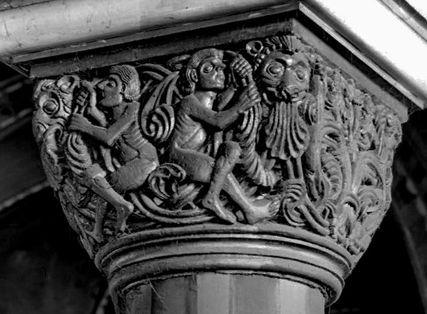 Sint-Servaaskerk: westwerk, kapiteel van een vrijstaande zuil in noordgalerij, kapiteel nr 4, oostzijde.